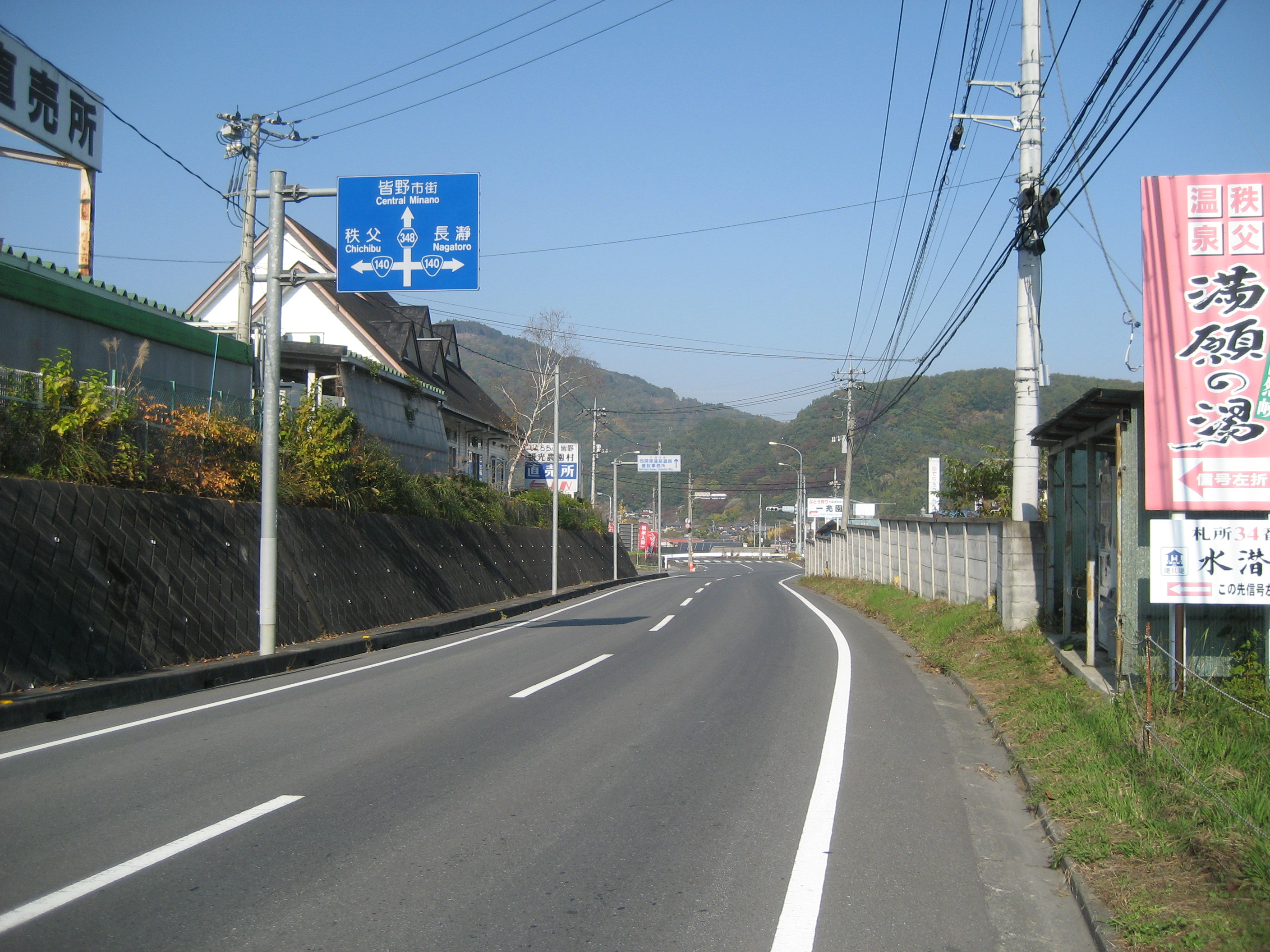 埼玉県道287号線皆野町内国道140号線との交差点付近